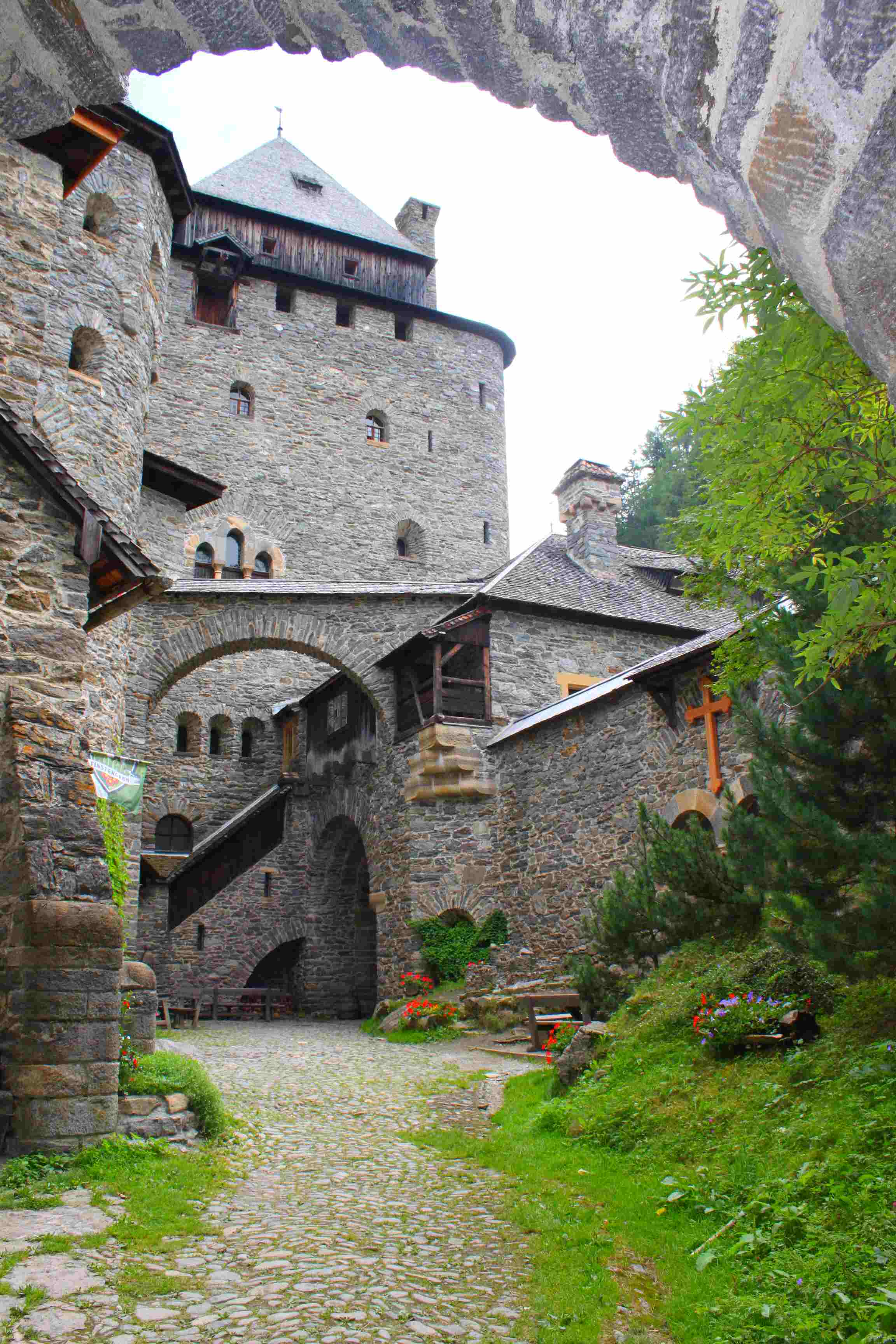 Die Burg Finstergrün, die heute als Jugendherberge genutzt wird, ist das Wahrzeichen von Ramingstein